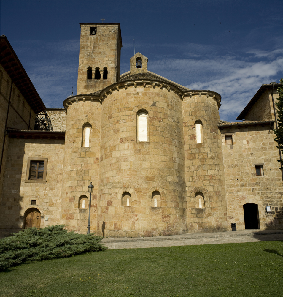 Monasterio de Leire, Navarre